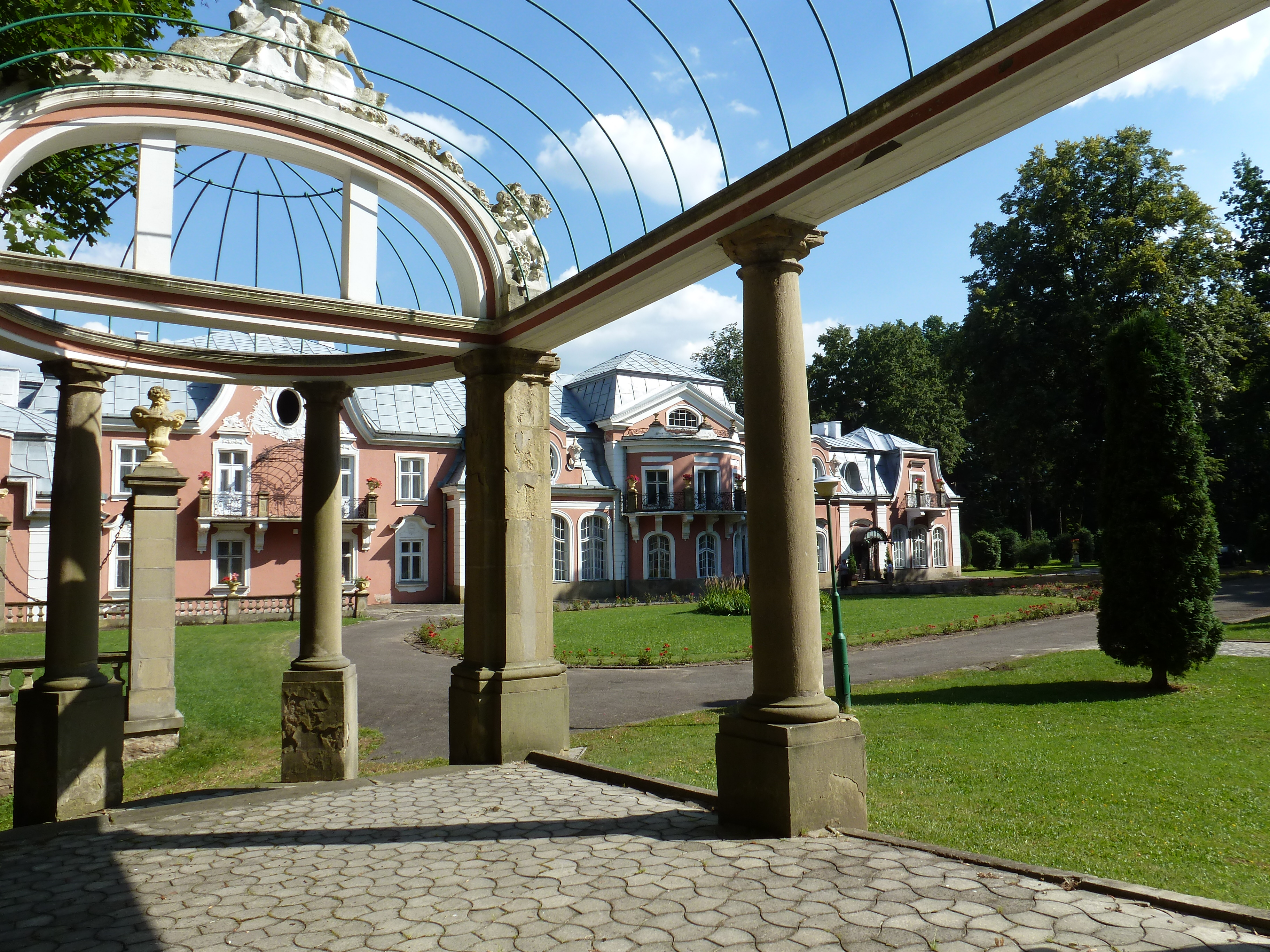 Gorlice Siary, ul. Węgierska 135-141 - pergola w zespole pałacowo-parkowym, 1908 P. Hłyń, Małopolski Instytut Kultury, 2013